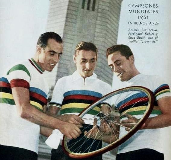 Coberta de la revista "El Gráfico": Antonio Bevilacqua (esquerra), Ferdinand Kubler (centre) y Enzo Sacchi (dreta) - 1951